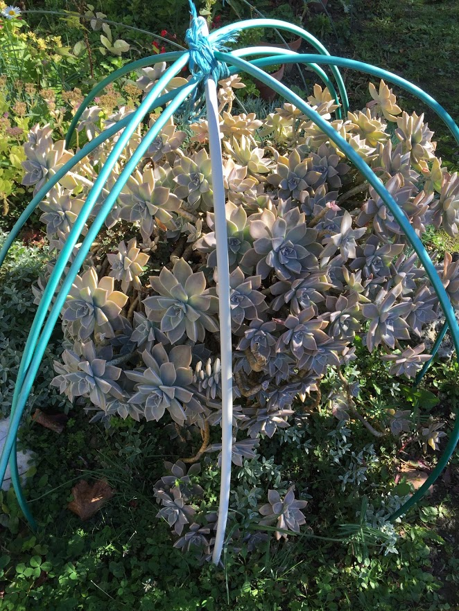 Graptopetalum paraguayense ou Porcelaine